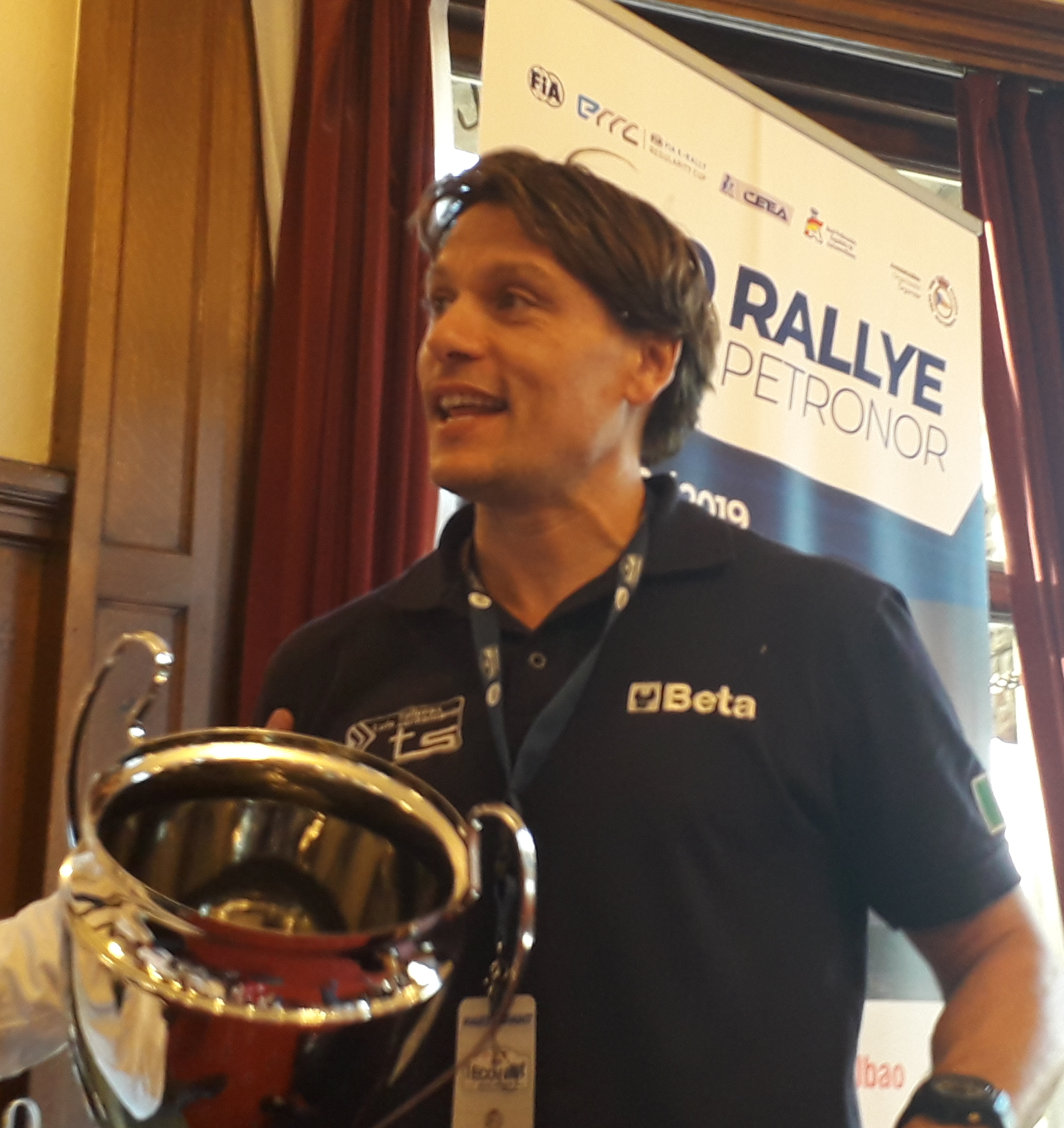 Il pilota di rally spagnolo Asier Santamaría all'Eco Rallye Bilbao-Petronor il 13 ottobre 2019